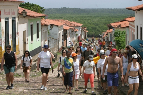 Touristen auf der Ladeira do Jacaré